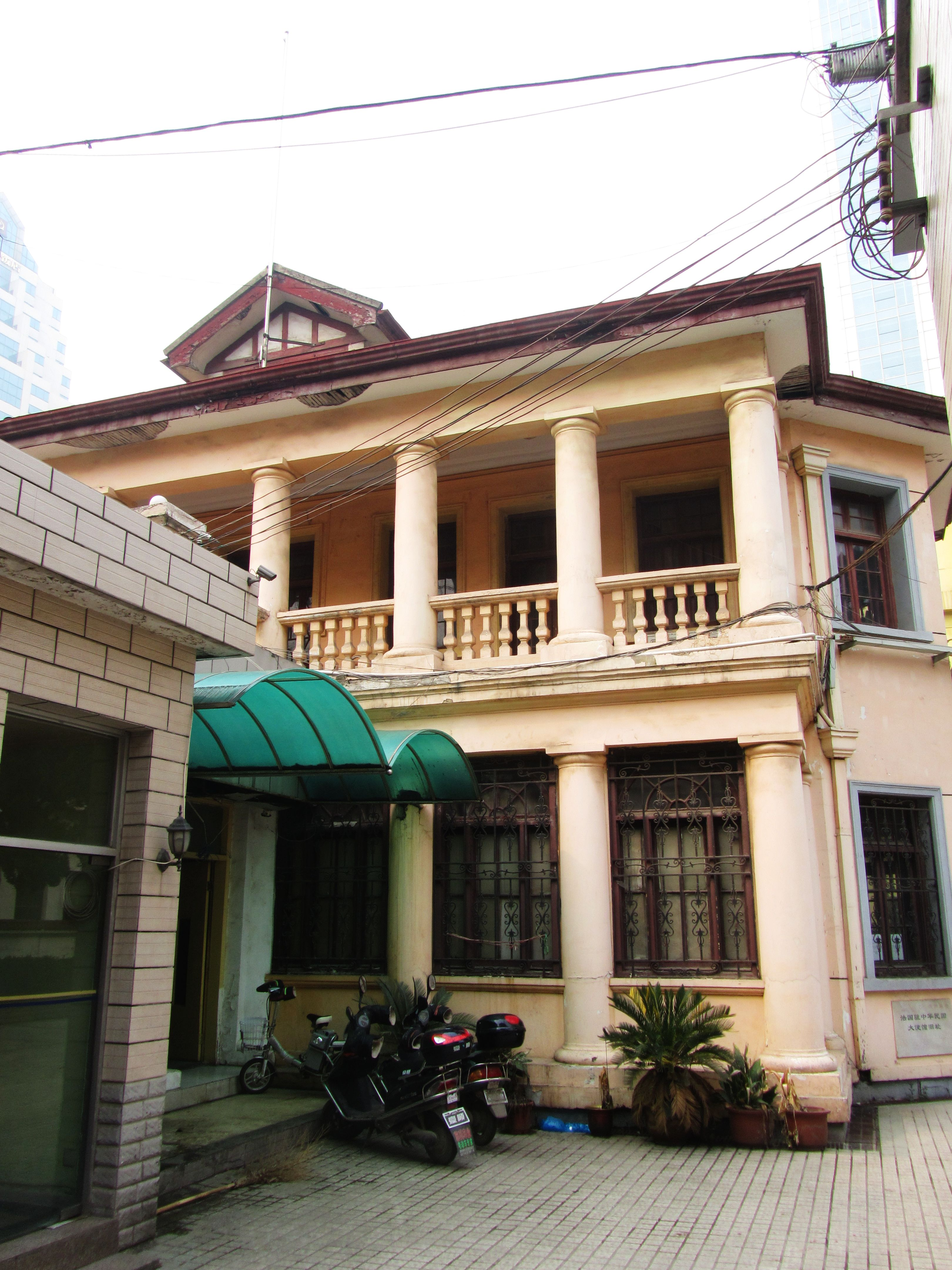 南京高云岭56号原法国驻中华民国大使馆旧址。